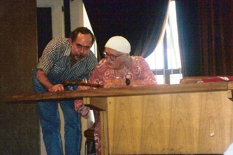 Jocelyn Brasil foi homenageado no XII Congresso do PCB, o Rio de Janeiro. Na foto ele autografa o livro Entre Letras e Baionetas para o camarada Sidnei Liberal.